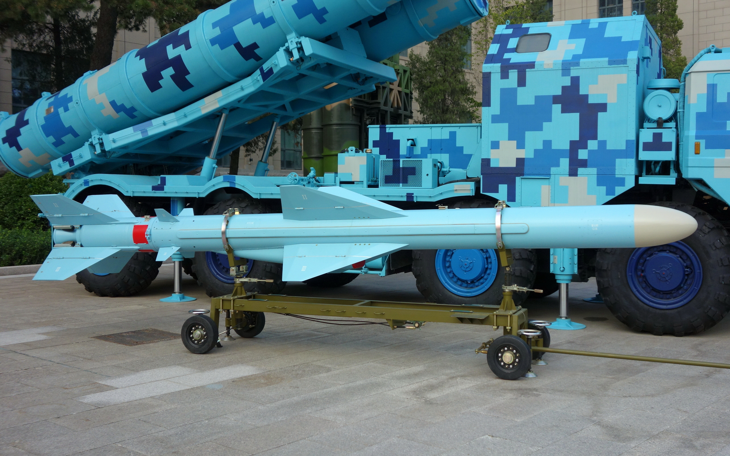 鹰击-83J 增程型舰对舰导弹